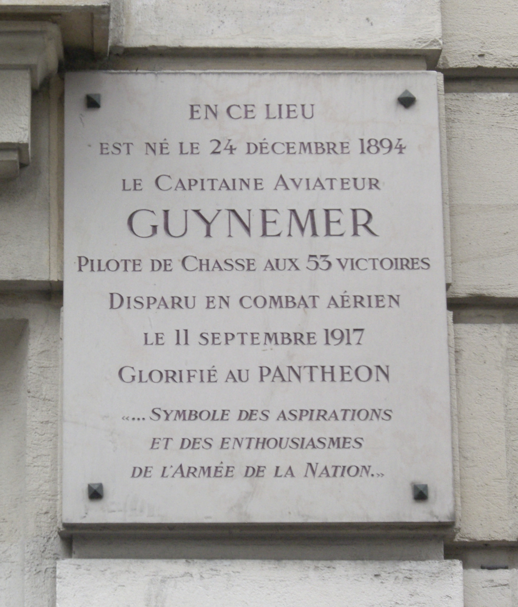 Plaque apposée au n° 89 de la rue de la Tour, Paris 16e.« En ce lieu est né le 24 décembre 1894 le capitaine aviateur Guynemer, pilote de chasse aux 53 victoires, disparu en combat aérien le 11 septembre 1917, glorifié au Panthéon ...symbole des aspirations et des enthousiasmes de l'armée de la Nation... »